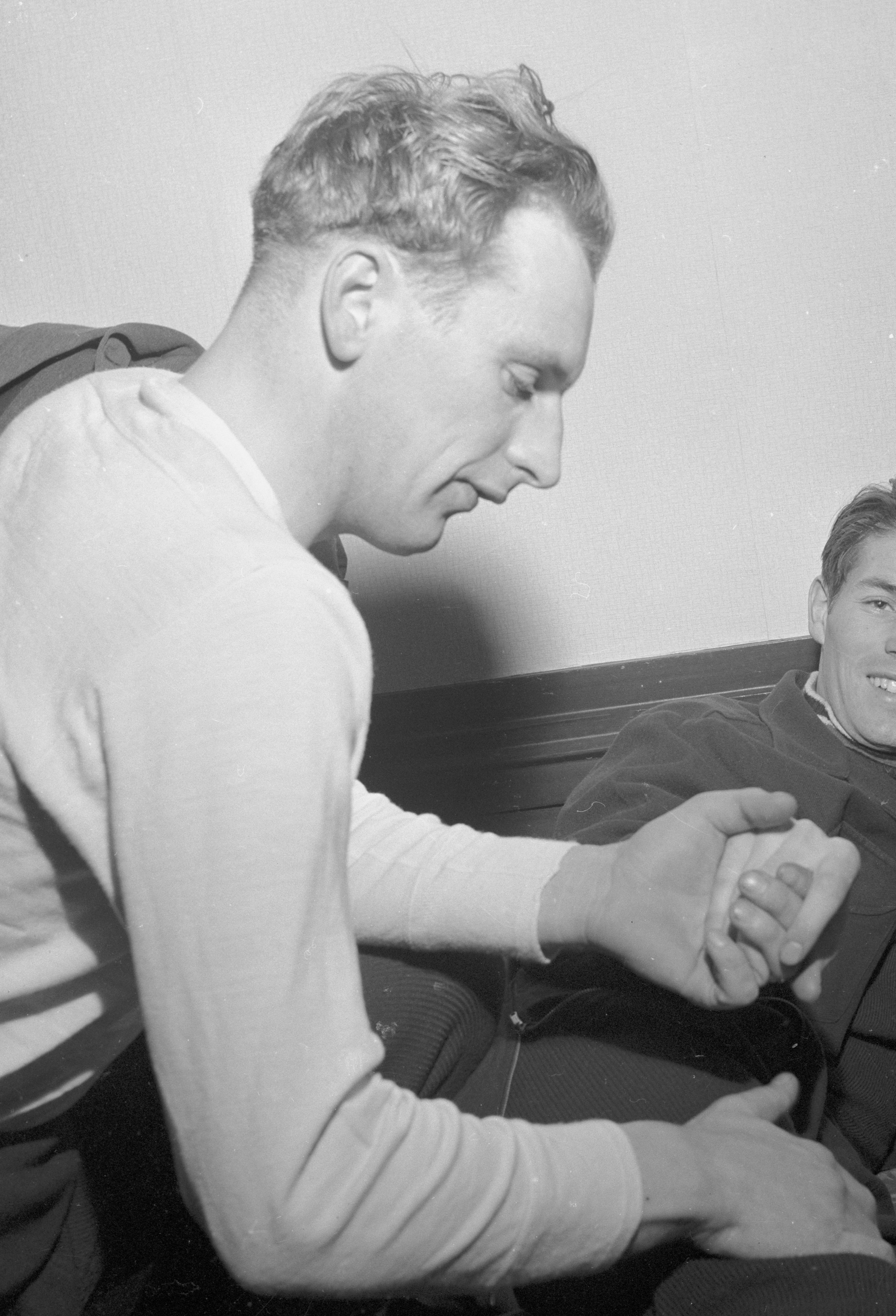 køyteløperen Sverre Haugli sammen med to andre ant. skøyteløpere